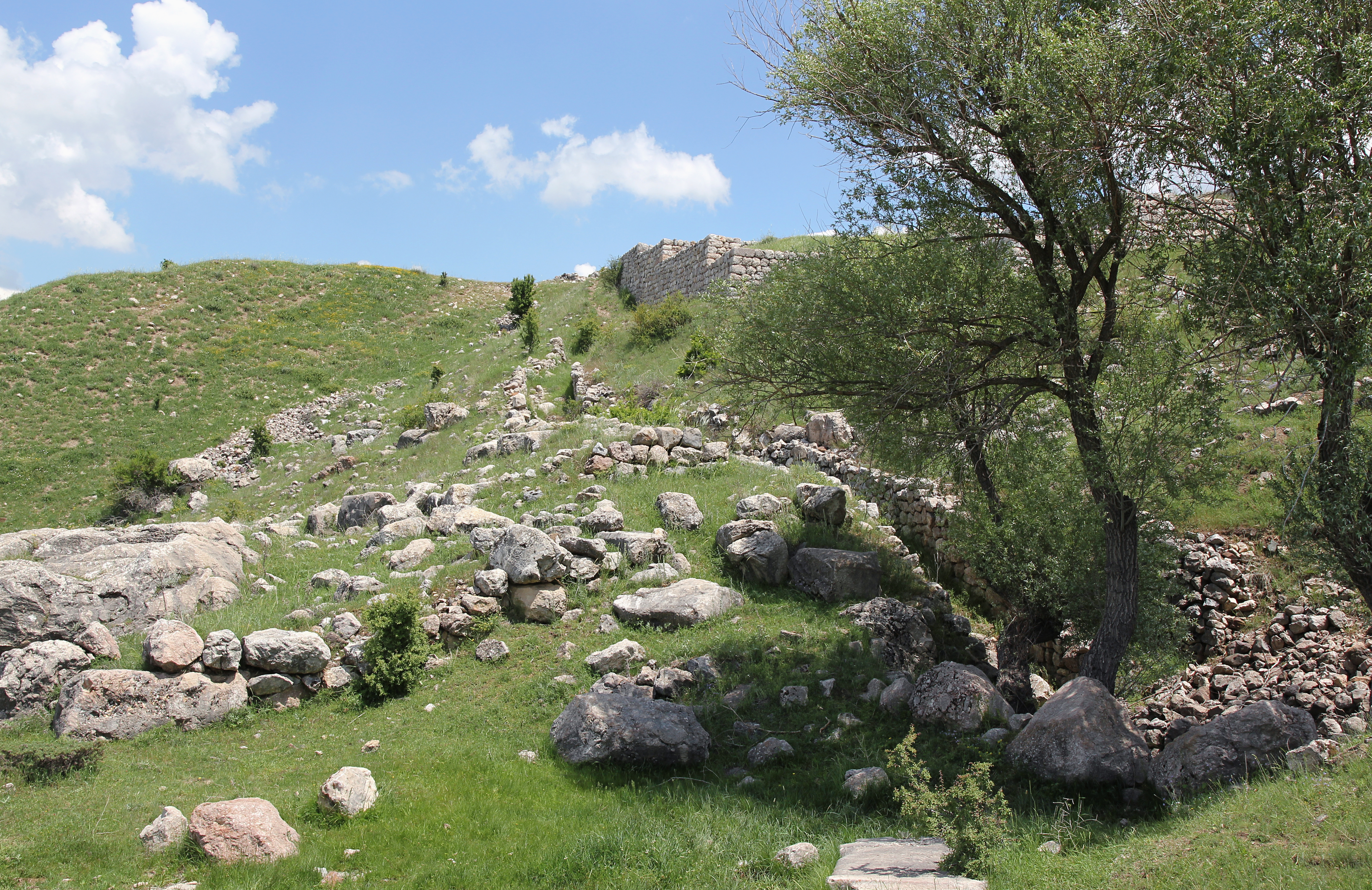 Büyükkale, die Zitadelle der hethitischen Hauptstadt Hattuša bei Boğazkale, Zentraltürkei, phrygische Treppe am Südwesthang von der Quelle zum Südwesttor